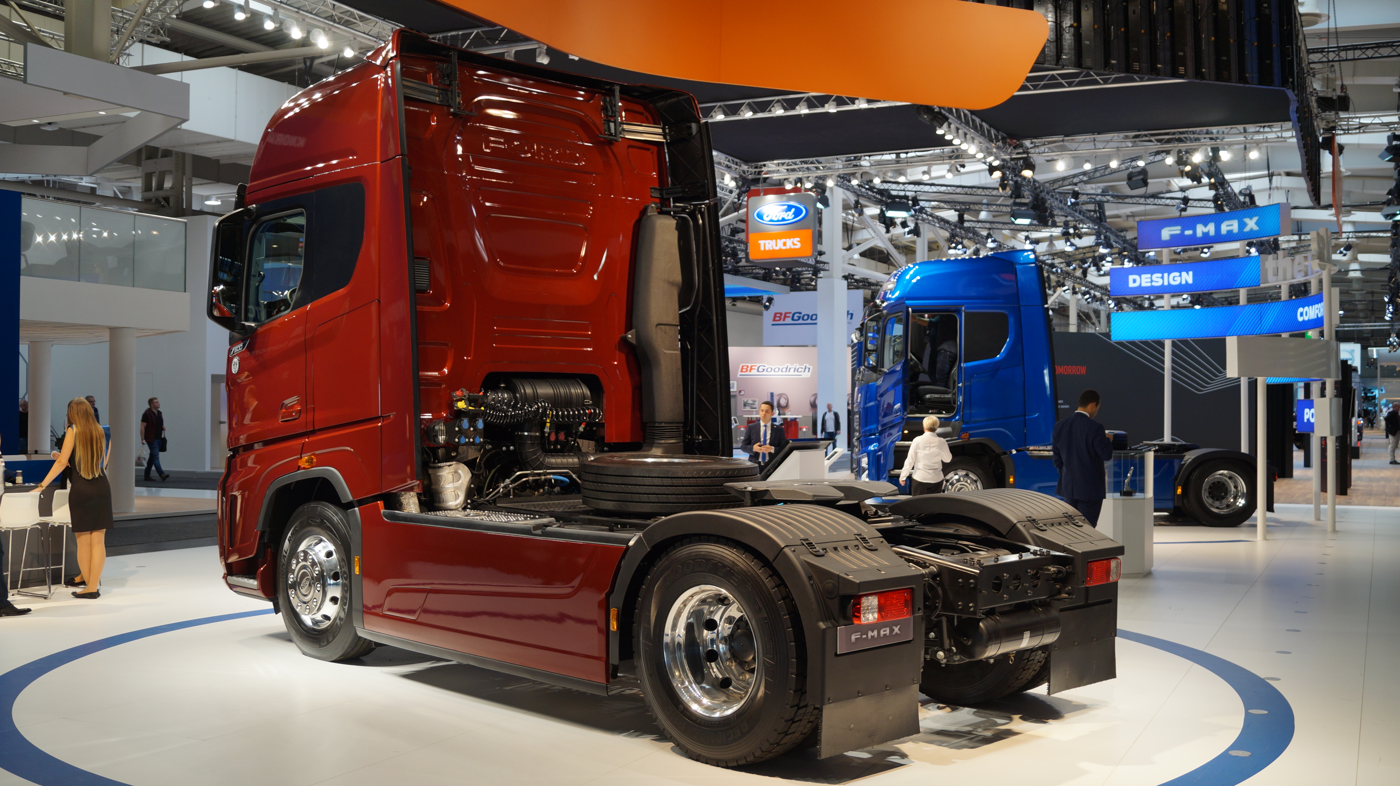 Schrägansicht des Hecks eines Ford F-MAX in der Metalliclackierung Red Rush, ausgestellt auf der IAA 2018.